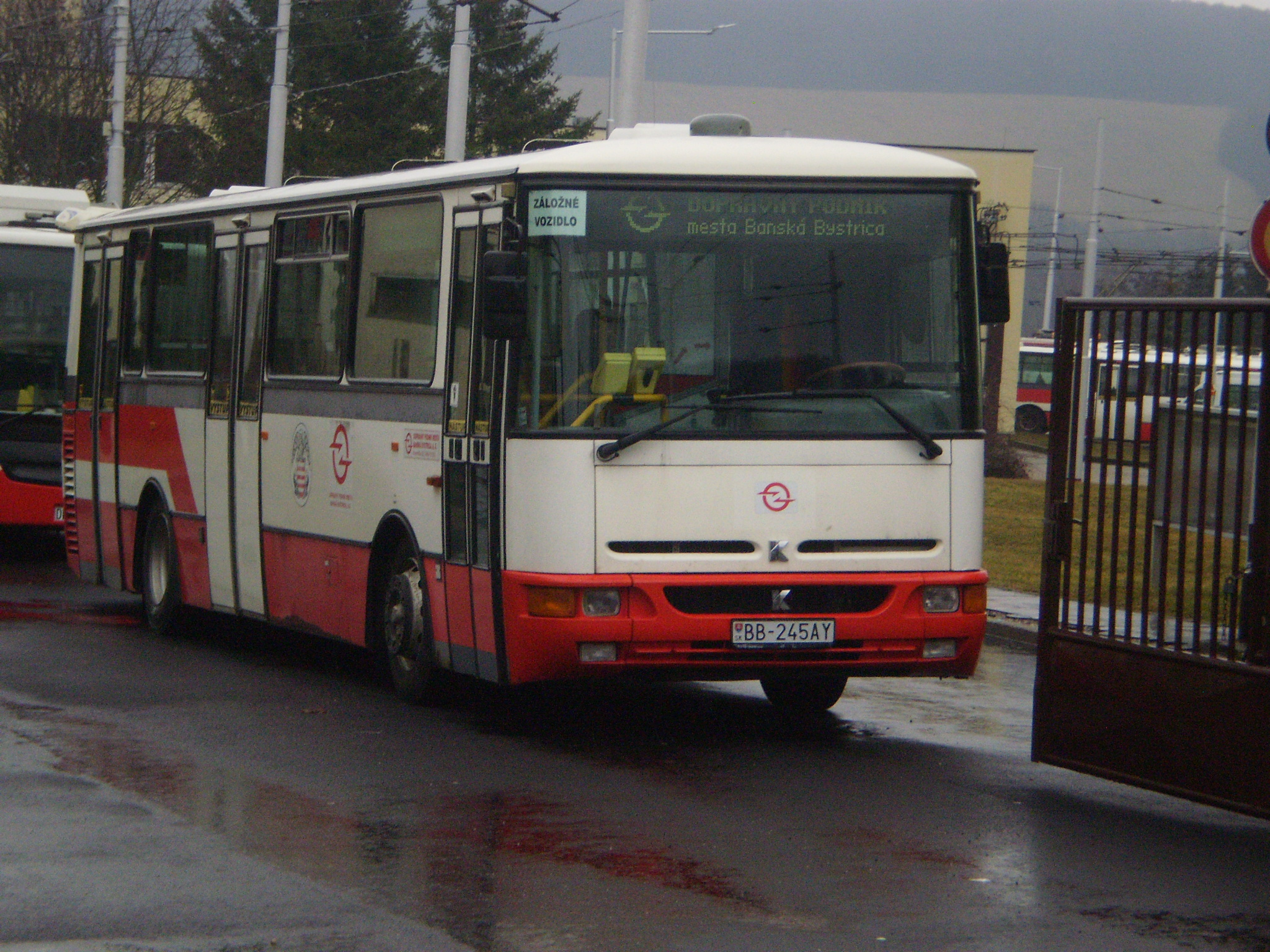 Vozovňa Kremnička